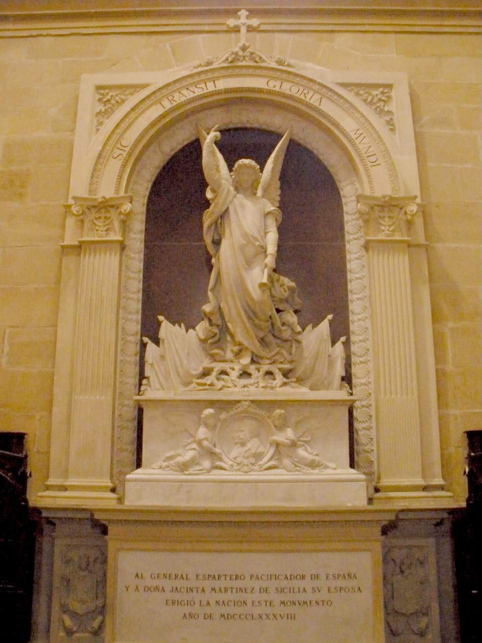 Tumba del general Baldomero Espartero, en la Catedral de Logroño